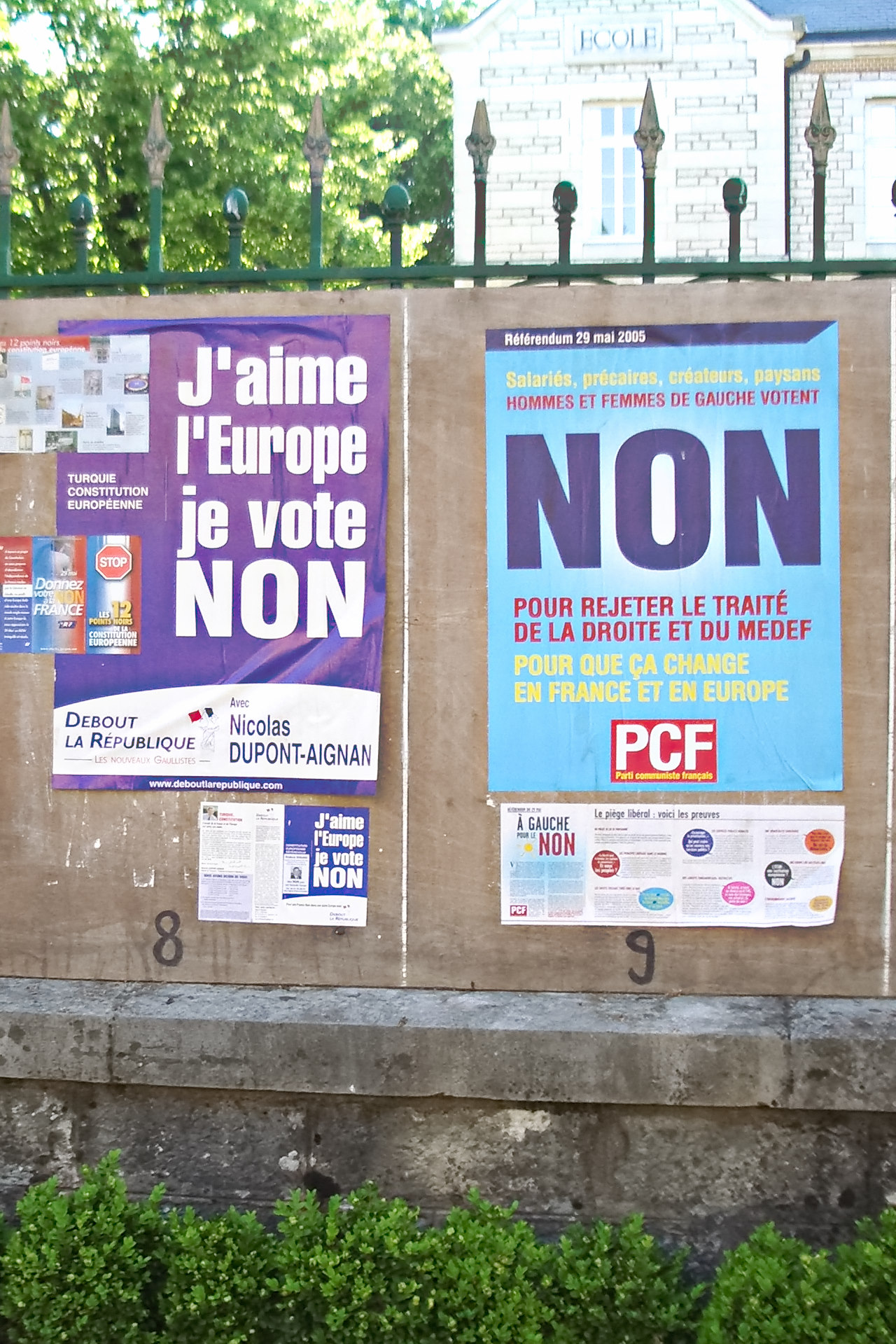 Werbeplakat für das Votum "Nein" beim Referendum für eine Verfassung Europas in Frankreich 2005 (angezeigtes Datum lt. EXIF-Daten des Bildes höchstwahrscheinlich falsch)